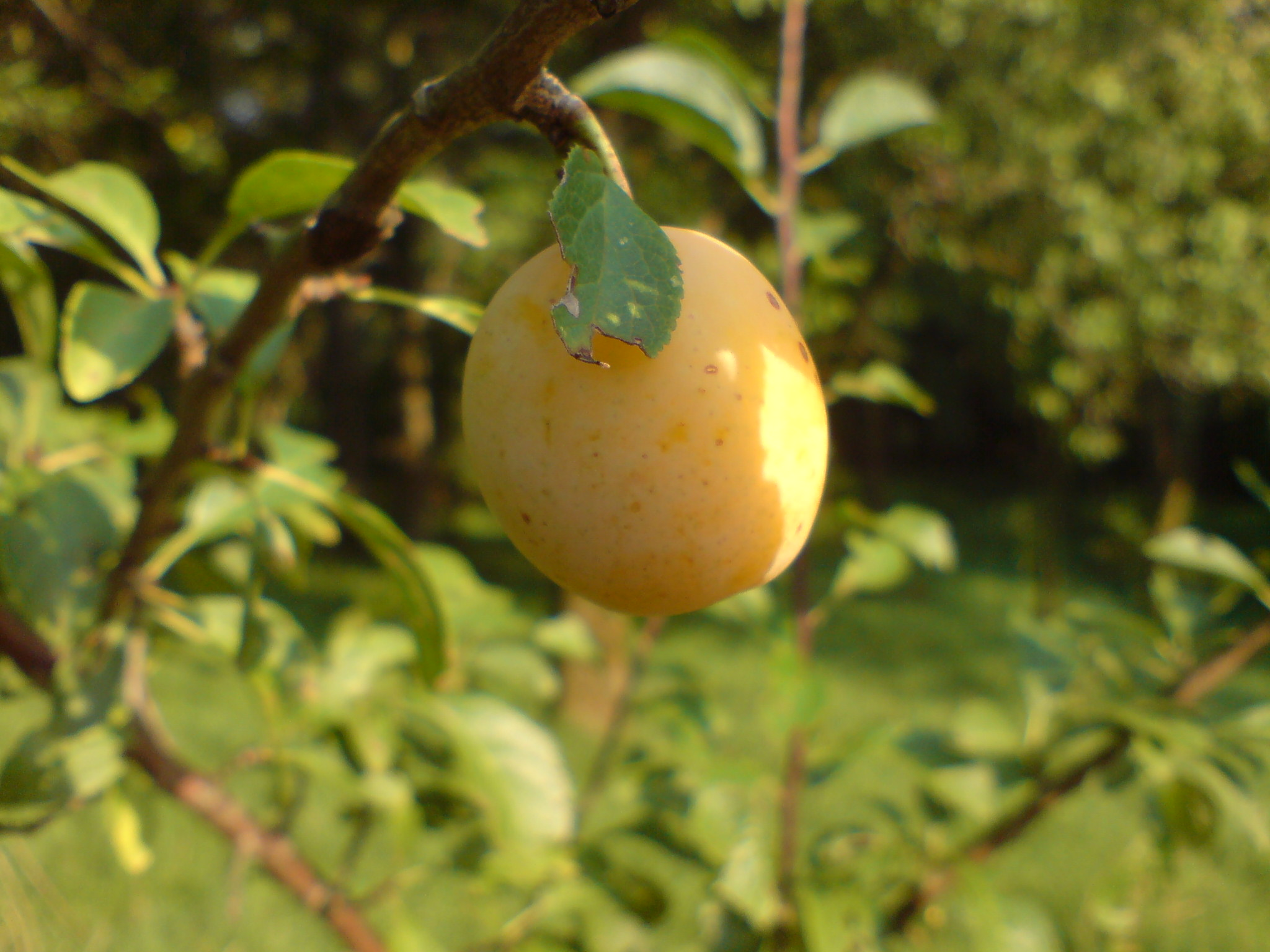 Die Pillnitzer Mirabelle ist eine Züchtung des Julius Kühn-Instituts aus Dresden Pillnitz. Sie wurde um 1990 gezüchtet.